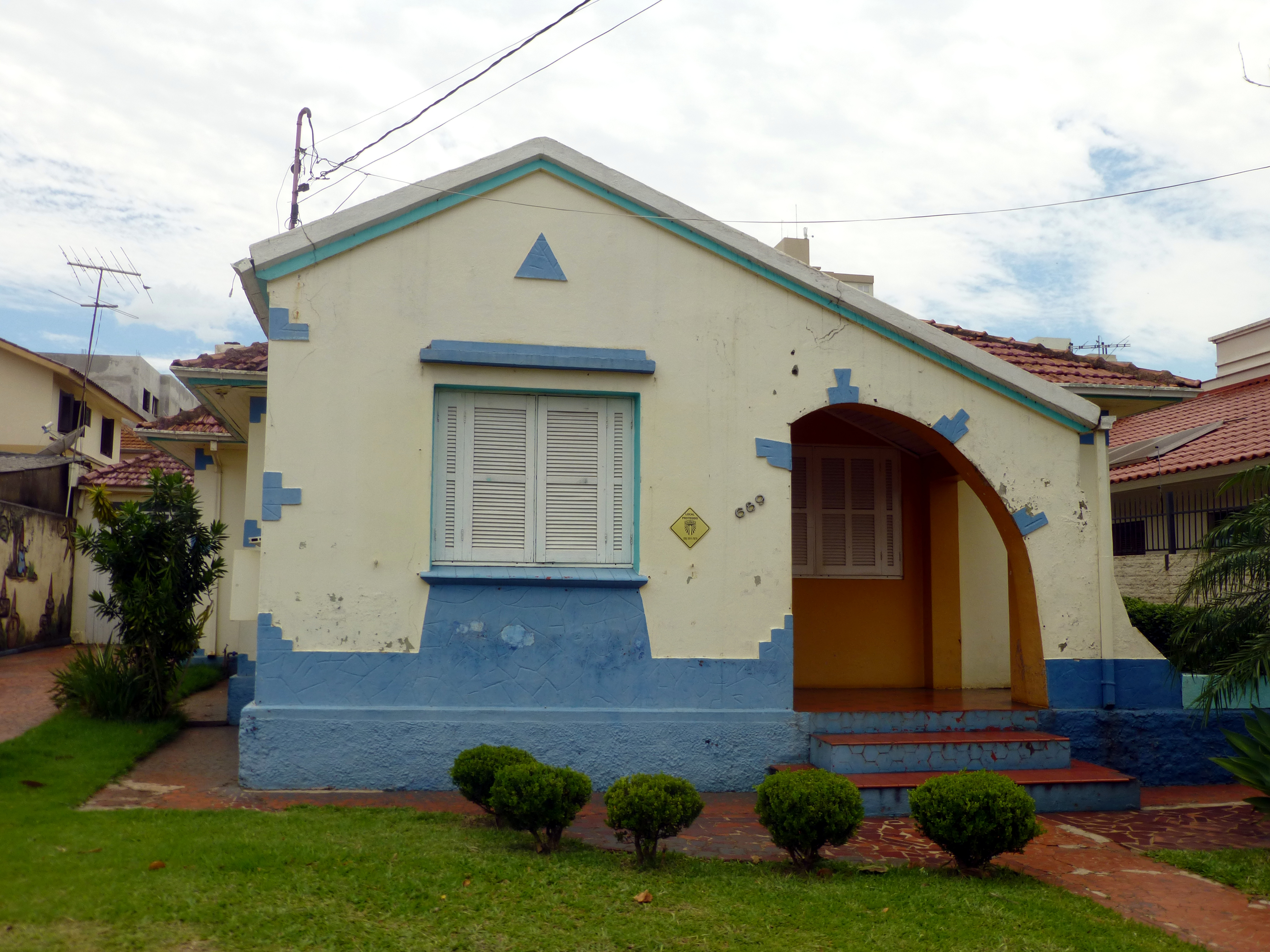 Casa natal de la presentadora y cantante infantil Xuxa Meneghel, hoy convertida en museo en la ciudad de Santa Rosa, Rio Grande do Sul, Brasil.